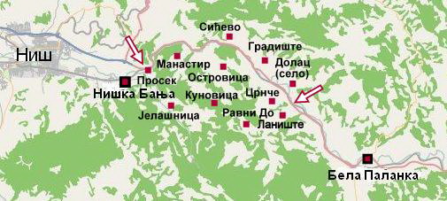 Sićevačka klisura (deo nasalja).